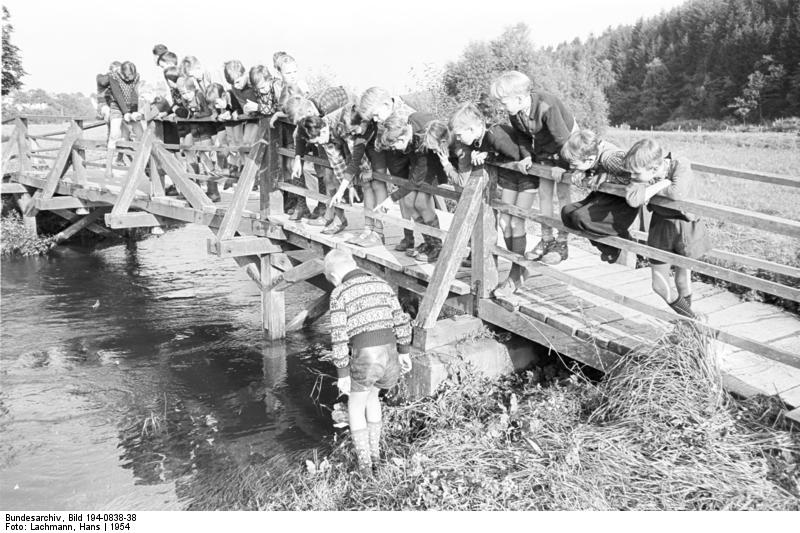 Waldheim der Inneren Mission, Altenkirchen. Freizeit im Sauerland, 1954